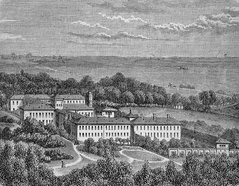 Sct. Hans Hospital er et psykiatrisk hospital beliggende i den tidligere Bidstupgård ved Roskilde.